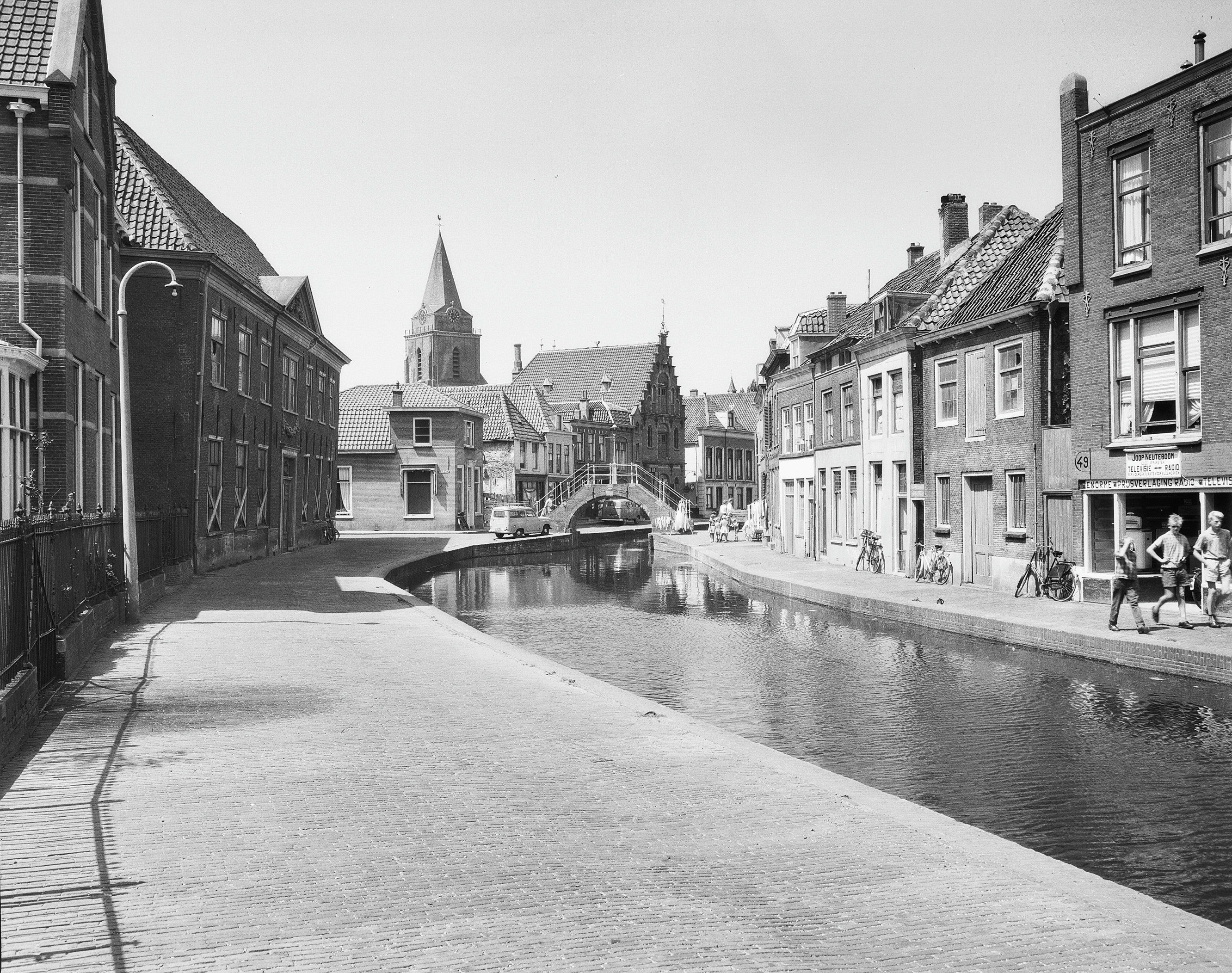 overzicht naar het westen